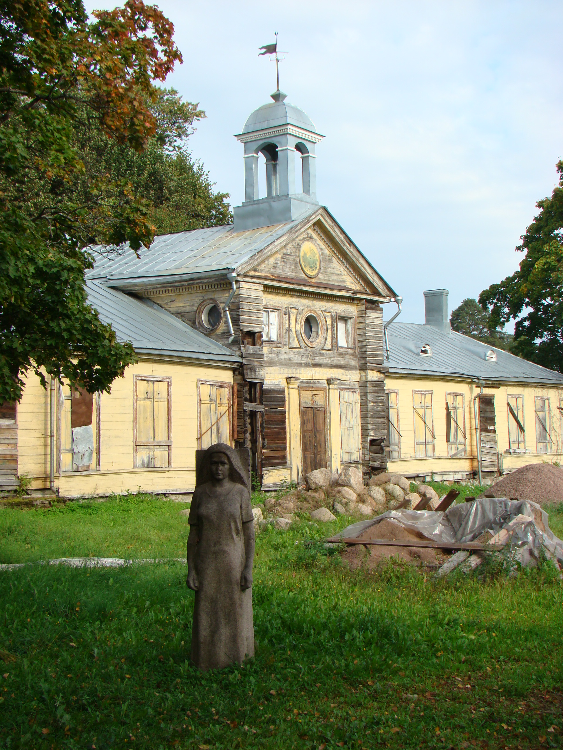 Комплекс усадебных домов и парковых сооружений (историко-архитектурный и природный заповедник усадьба-парк «Монрепо». Статуя «Крестьянка» с дома Лалукки) (Лен.область, Выборг, парк Монрепо (парк Культуры и отдыха))